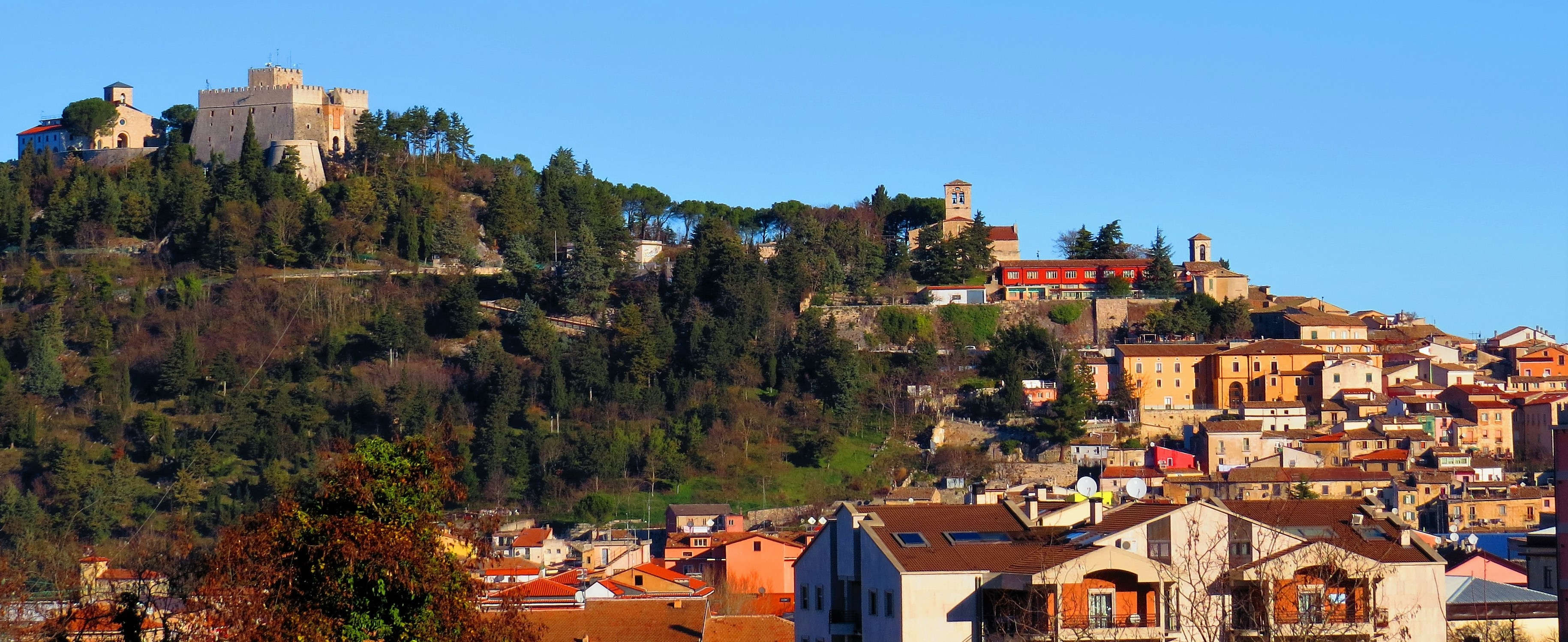 Campobasso